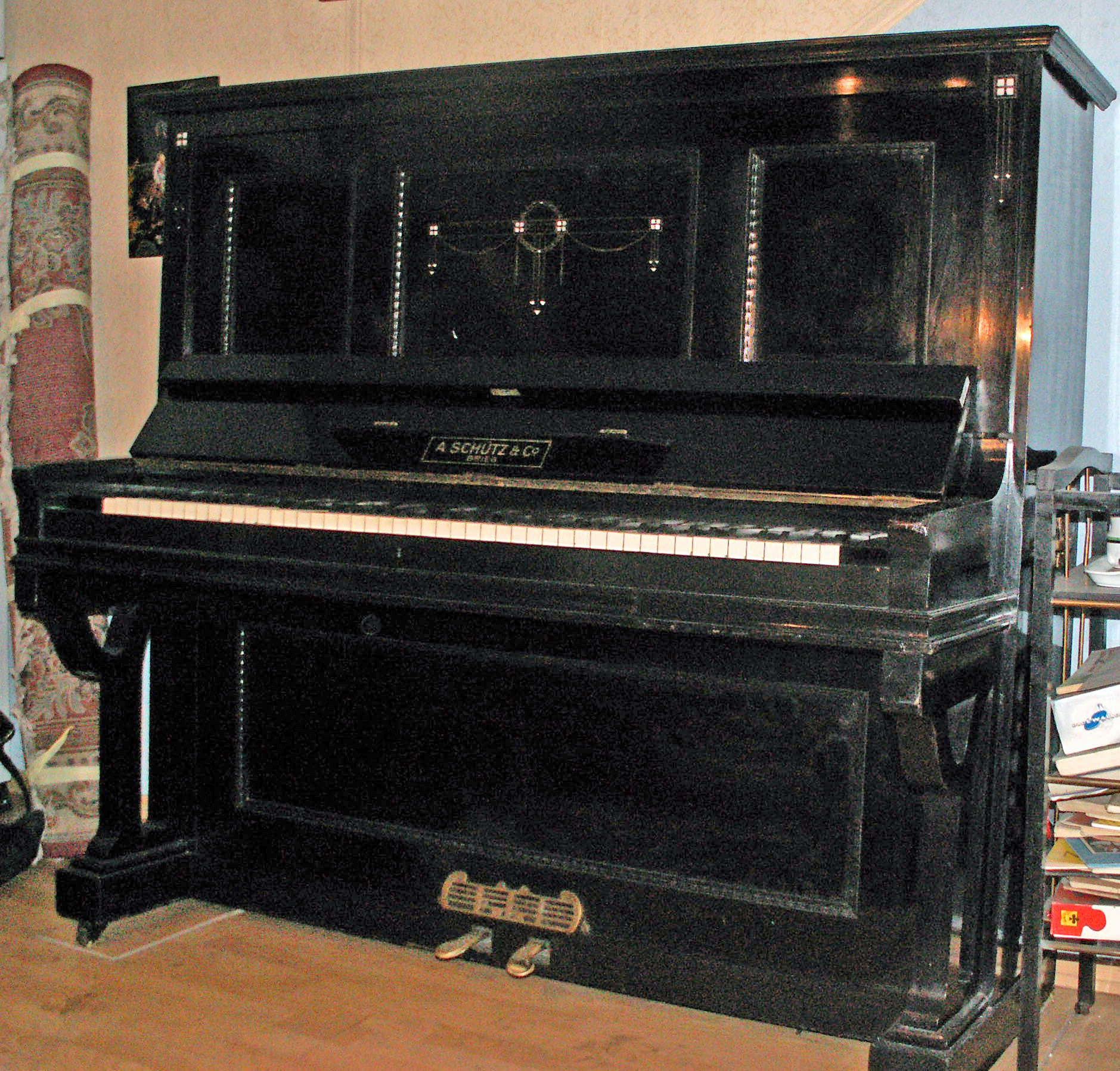 Pianino Schutz